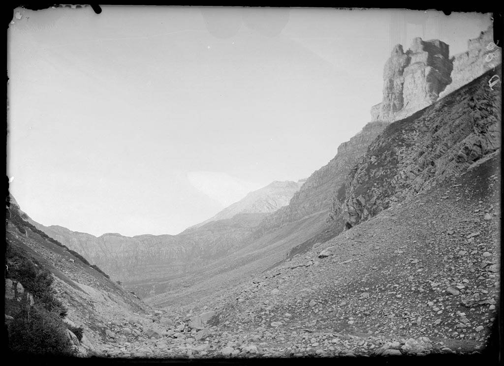 Imatge